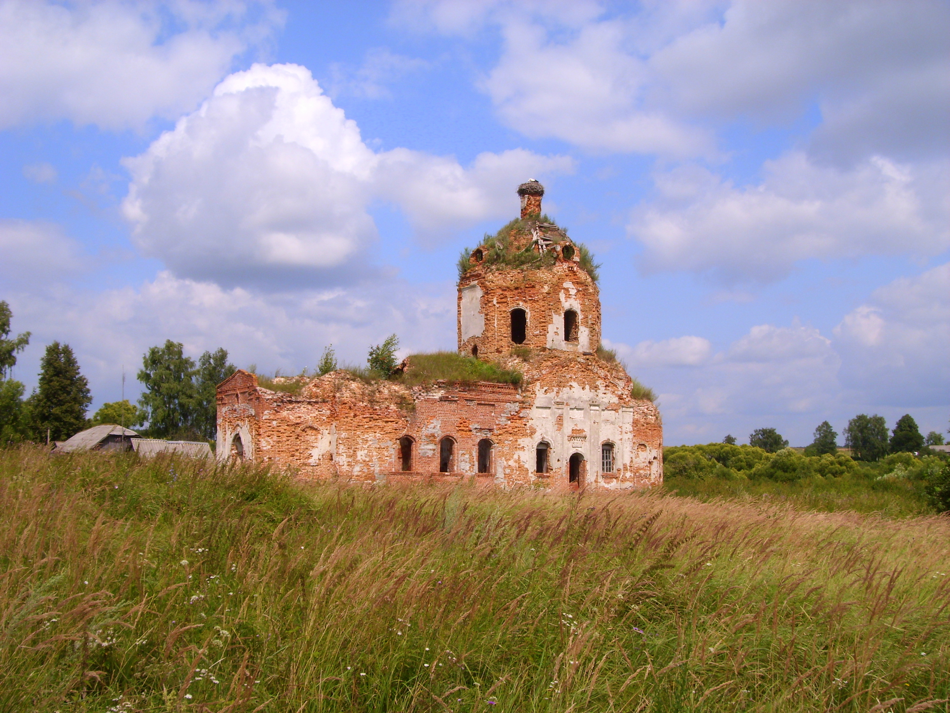 Церковь Рождества Богородицы (Брянская область, Жирятинский район, с. Княвичи)